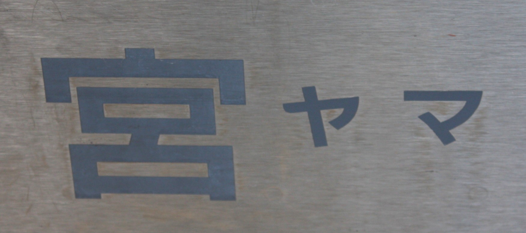 小山車両センター 宮ヤマ所属表記